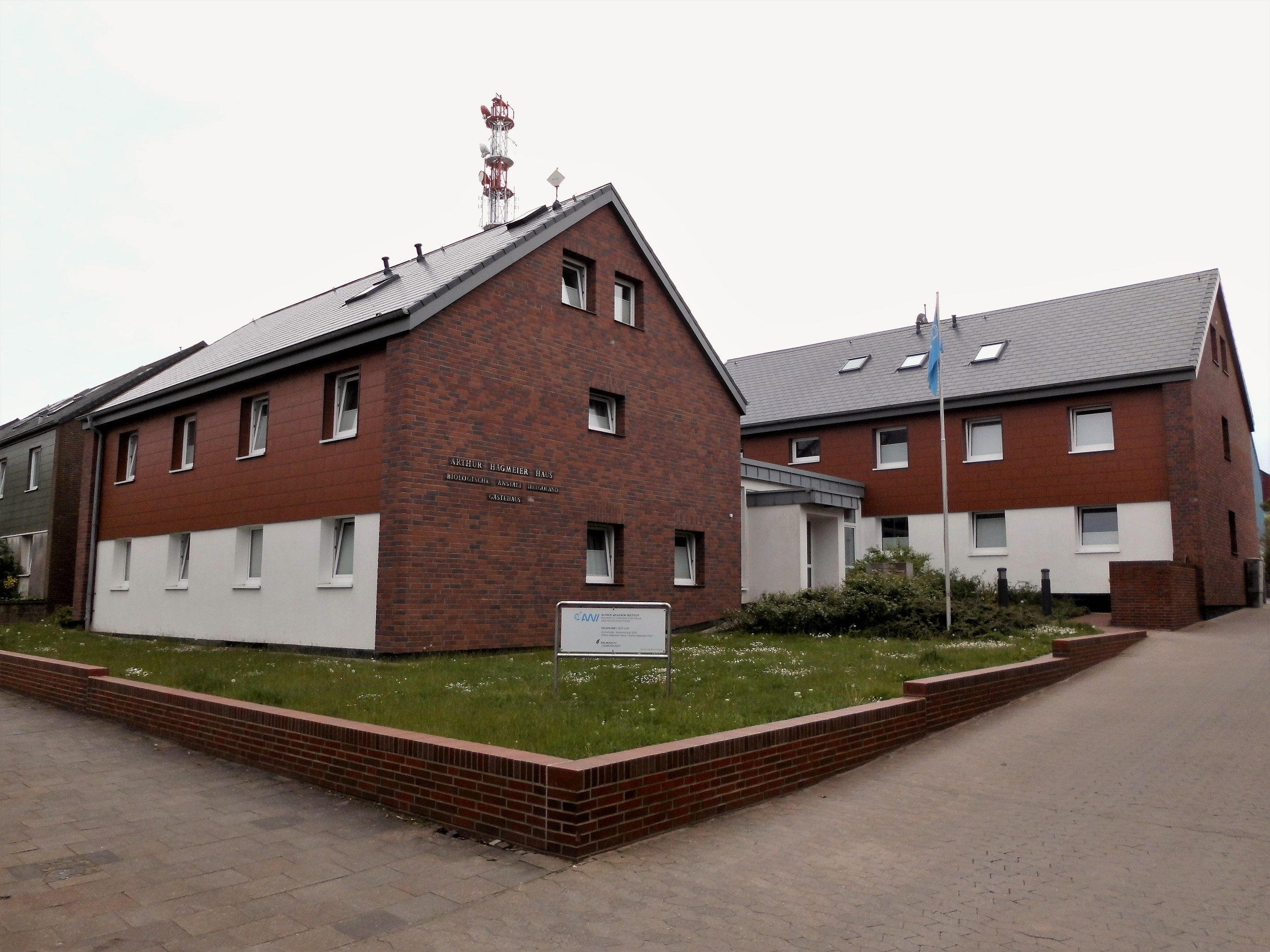 Das Gästehaus des Alfred-Wegner-Instituts, Helgoland. Es wurde benannt nach dem Meeresbiologen Arthur Hagmeier.